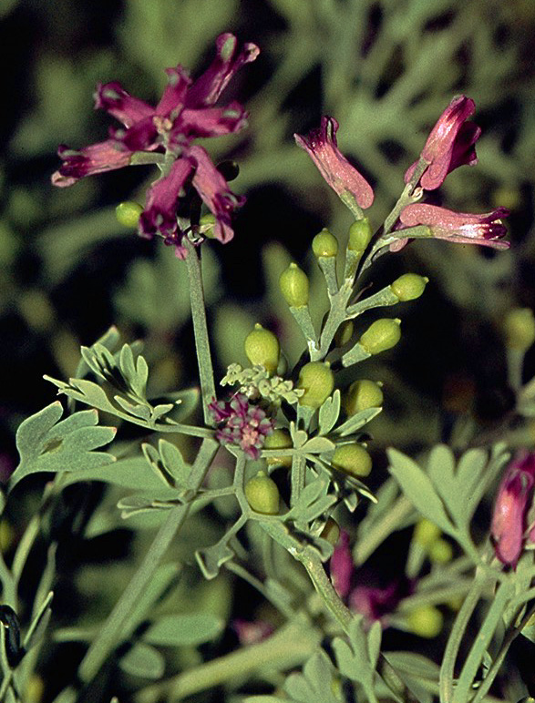 Fumaria schleicheri in Unterfranken, Germany